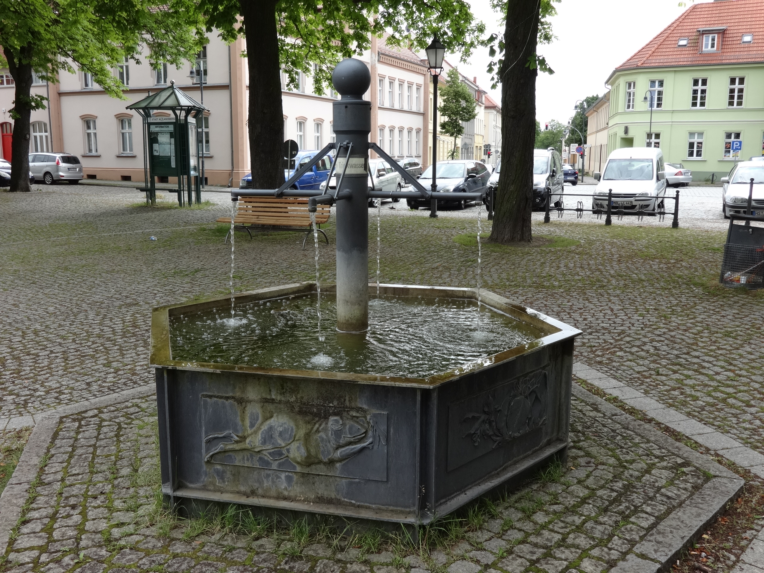 Brunnen von Johannes Niedlich am Marktplatz in Altlandsberg, Landkreis Oder-Spreewald, Brandenburg